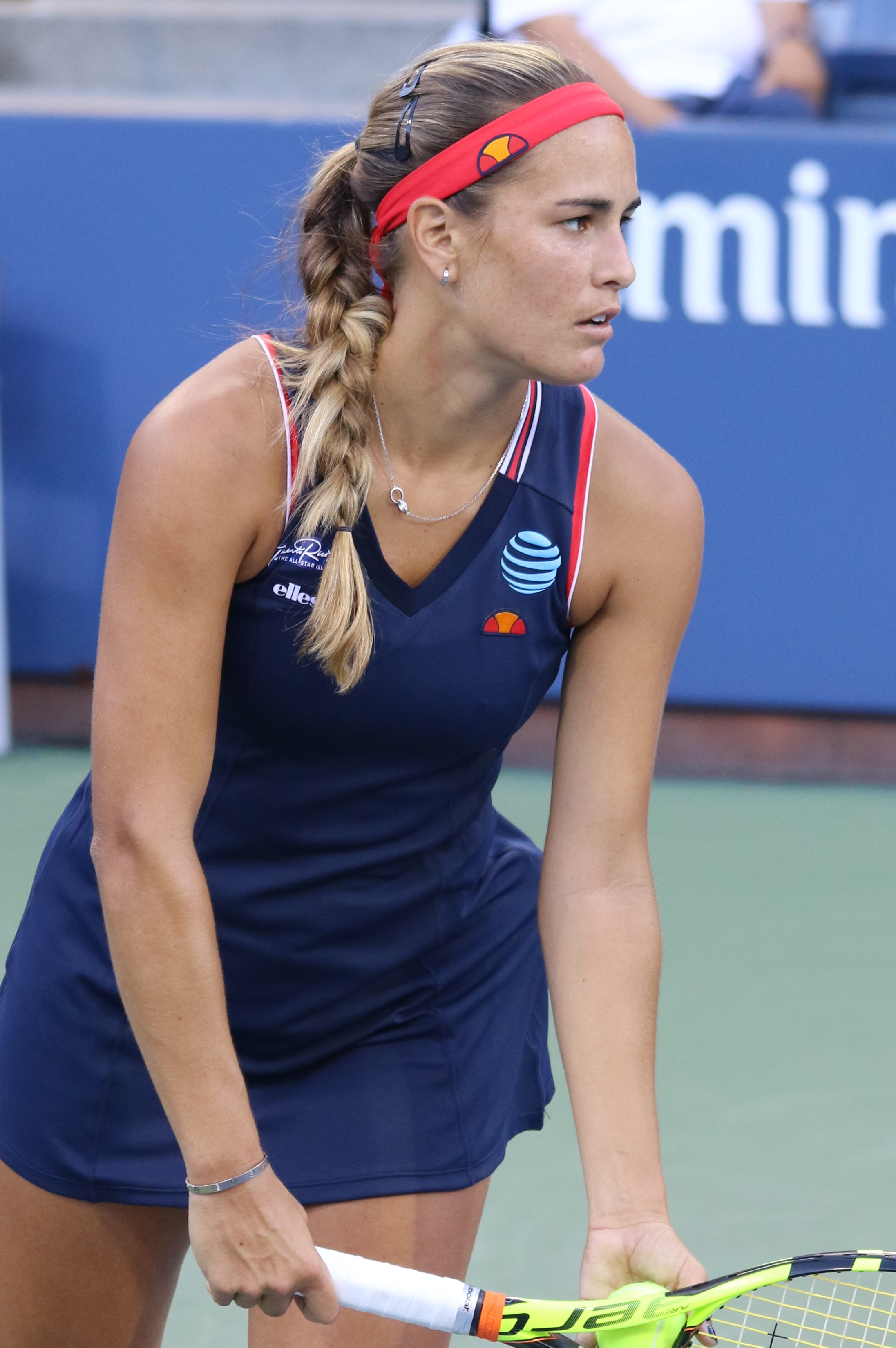 Puig US16 (38)